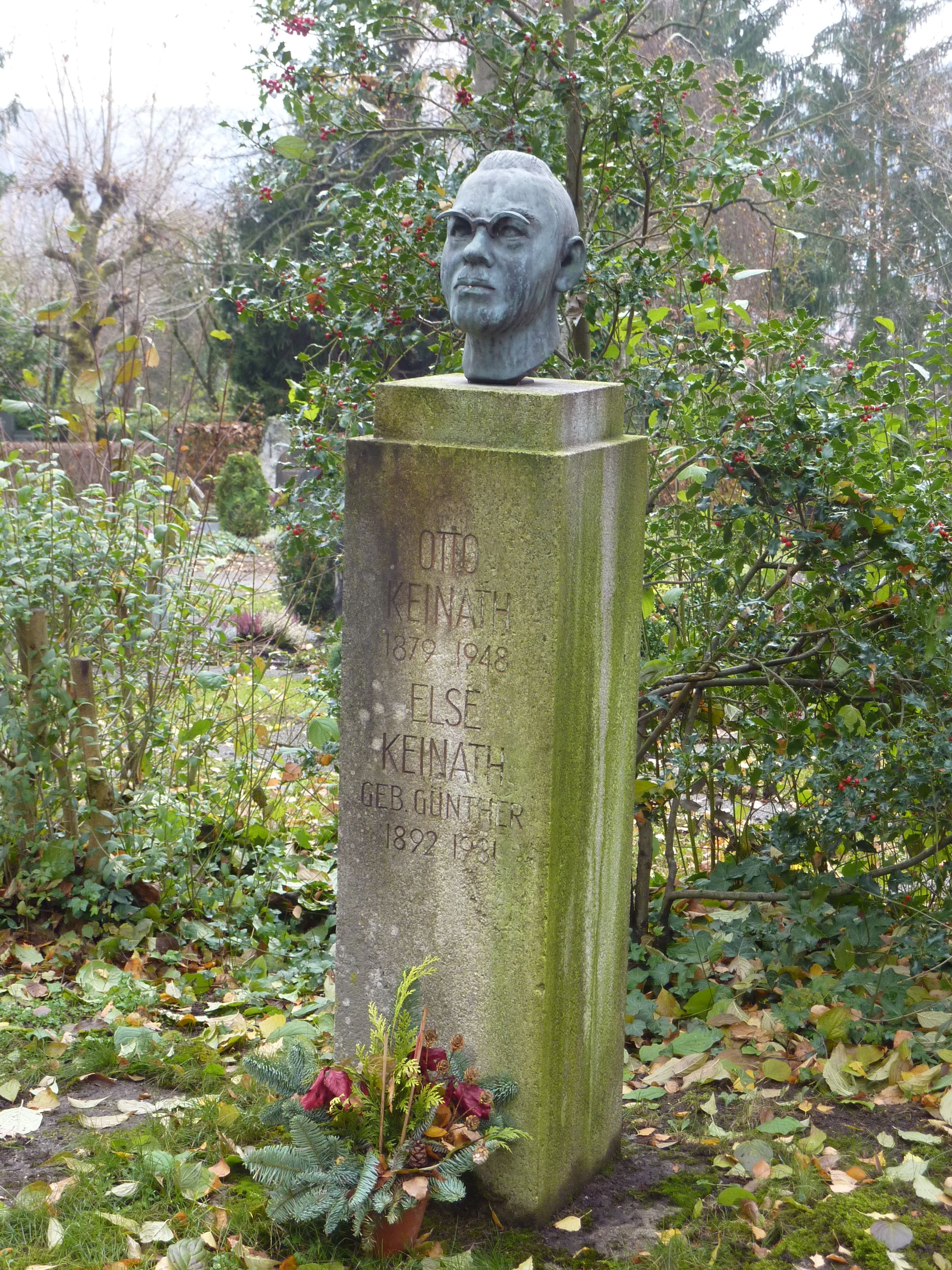 Grabstätte Keinath